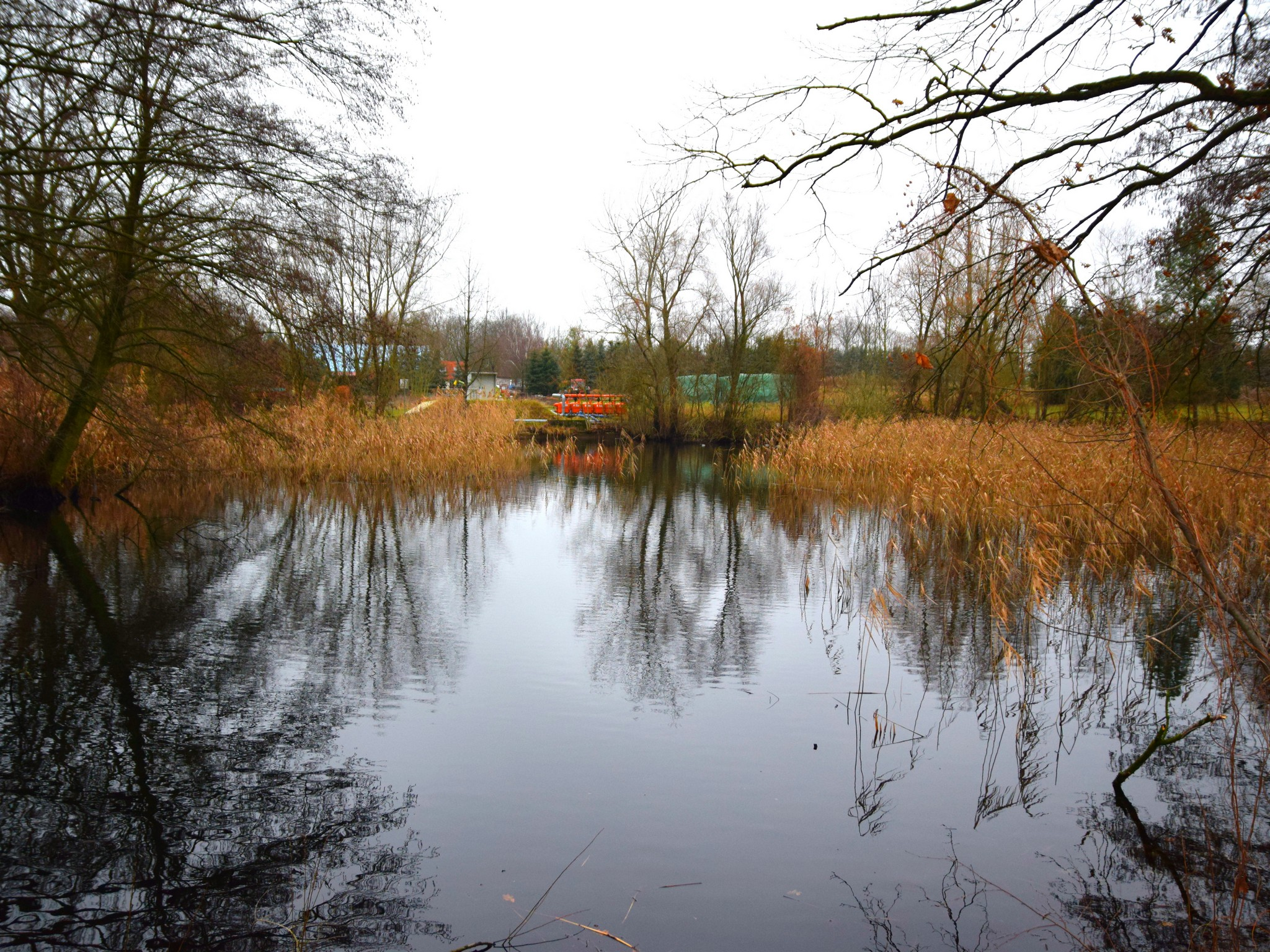 Zubringerteich Frankfurt (Oder)-Markendorf